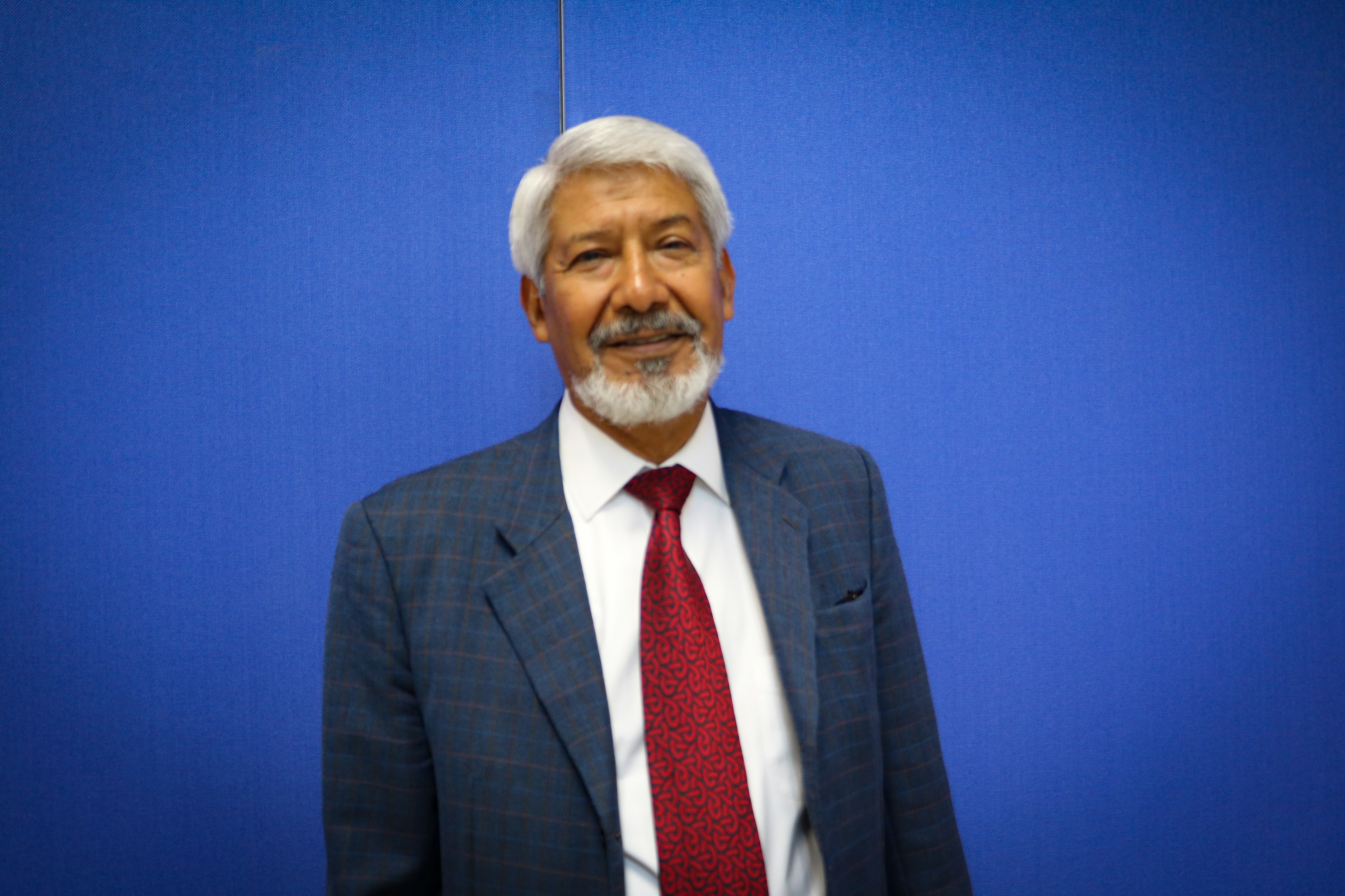 Para el doctor José Luis Morán, el trabajo multidisciplinario fue clave en la visión fundacional del Ipicyt.